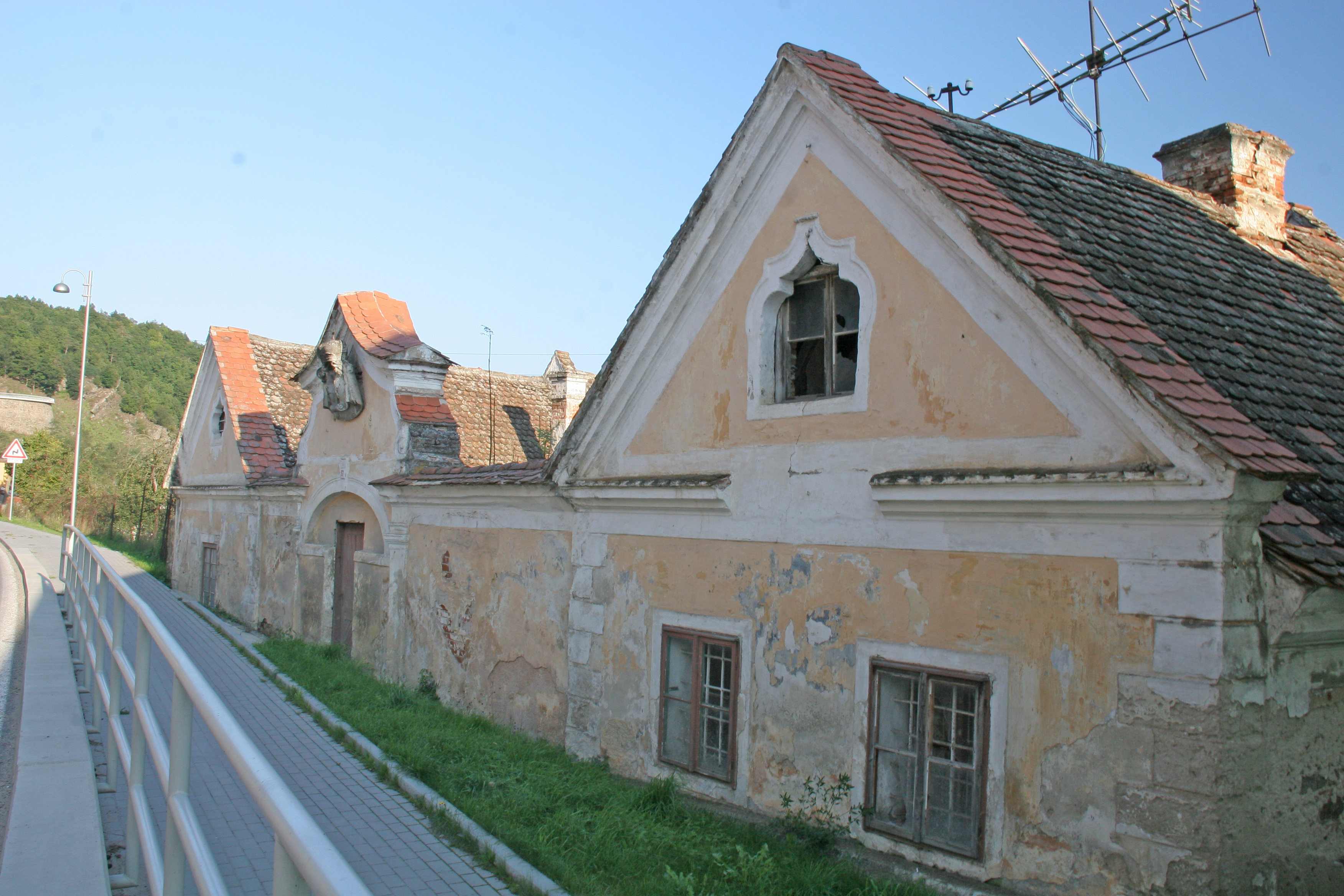 Vodní mlýn, Vranov nad Dyjí 67, Vranov nad Dyjí.